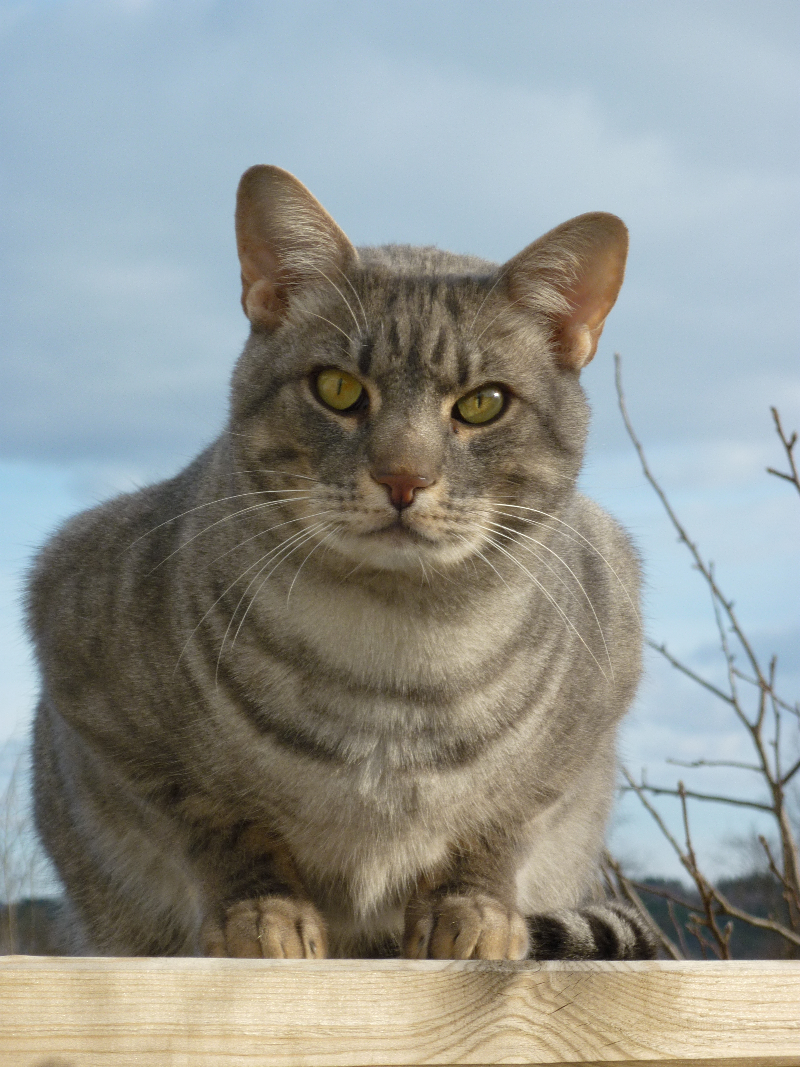 OCI as 24 Blåsølvspottet ocikatt, (N)Libitum Odin